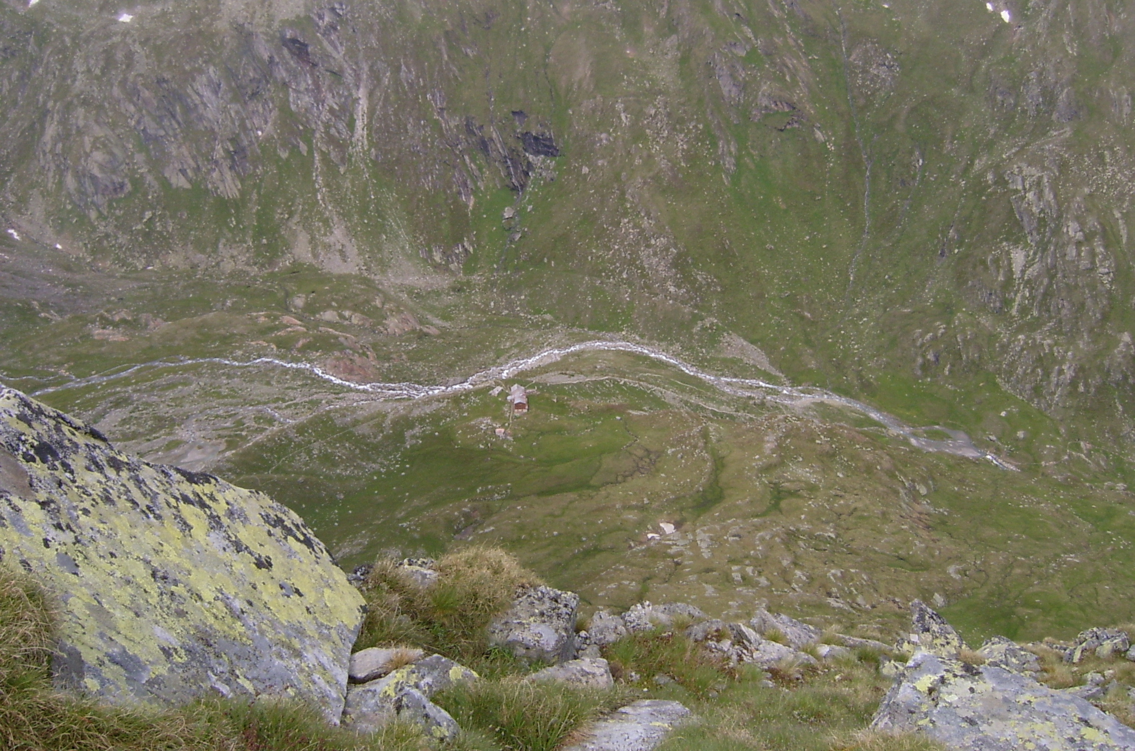 Essener-Rostocker-Hütte im Talschluss des Maurertales vom Rostocker Eck aus gesehen. In der Mitte der Maurerbach deutlich zu erkennen. }